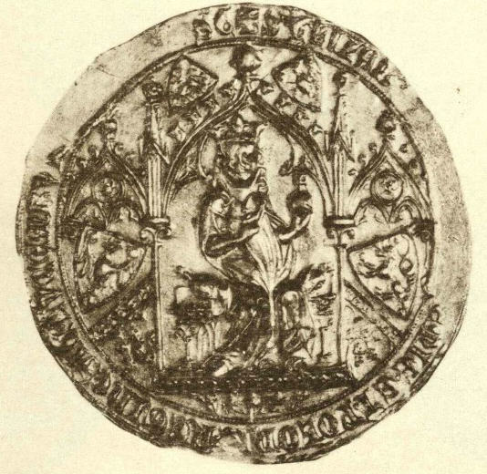 This is a scan of the historical document: Title: Die Siegel der deutschen Kaiser und Könige v. 1 (751 - 1347)